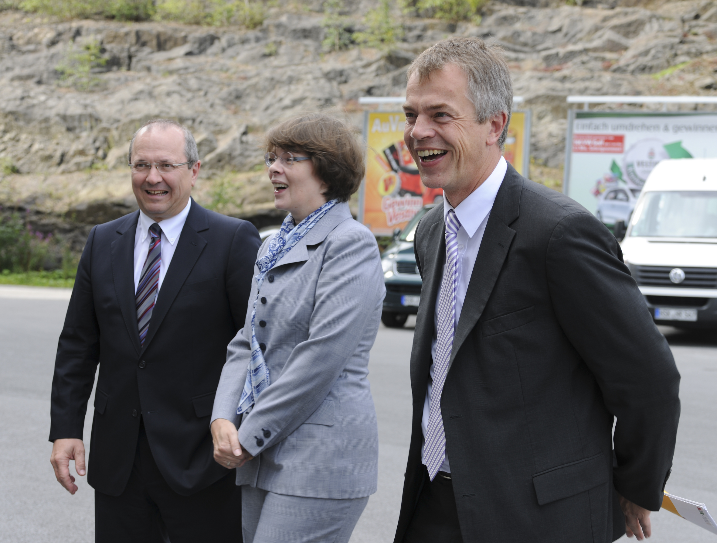 Energieeffizienz bei Veltins Klimaschutzminister Johannes Remmel hat auf der vierte Etappe seiner Klimaschutztour am 10. August 2011 drei Unternehmen besucht, die besonders energieeffizient arbeiten. „Klimaschutz und wirtschaftliches Denken gehört zusammen. Wer Energie spart, entlastet seine Ausgabeseite. Klimaschutz ist somit keine Umwelt- und Naturromantik, sondern pure ökonomische Vernunft“, sagte Minister Remmel. Die Unternehmen Dralon (Dormagen), Busch-Jaeger Elektro (Lüdenscheid) und die Brauerei C. & A. Veltins (Meschede) nehmen am Projekt Mod.EEM (Modulares Energieeffizienzmodell) der EnergieAgentur.NRW teil. Bei diesem Pilotprojekt wird ein online-gestütztes Energiemanagementssystem entwickelt. Rund 100 Unternehmen aus NRW nehmen daran bereits teil. Weitere Informationen unter: Flickr tags: Brauerei; Veltins; Meschede; Lüdenscheid; Busch-Jaeger; Klimaschutztour; 2011; NRW; EANRW; Minister; Johannes Remmel; Klimaschutz; EnergieAgenturNRW; Energiewende; Energieeffizienz